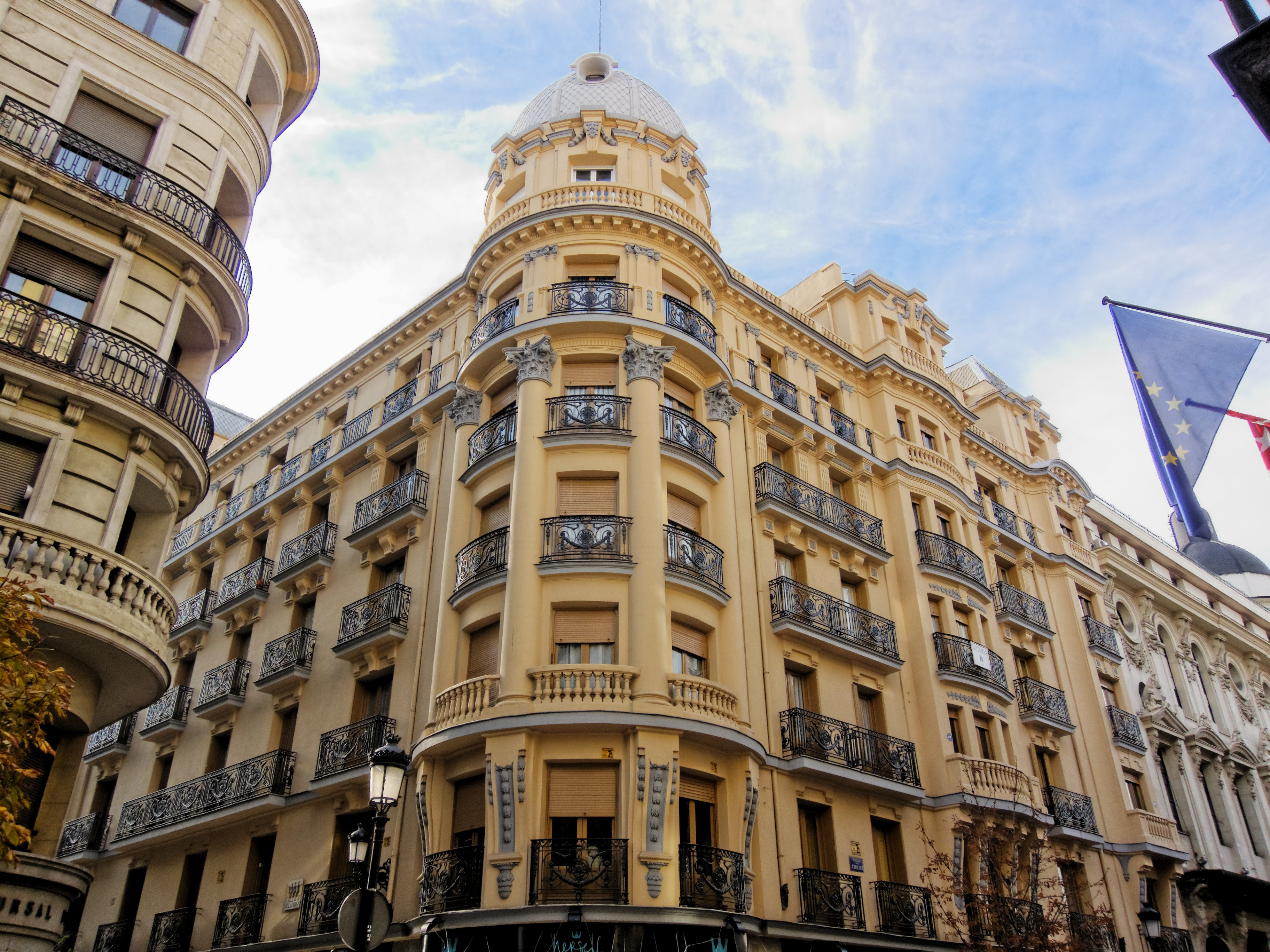 Edificio de la calle de Atocha Nº 20, Madrid. Antiguas viviendas para D. Ramón Sainz de Carlos. Arquitecto: Pablo Aranda Sánchez.